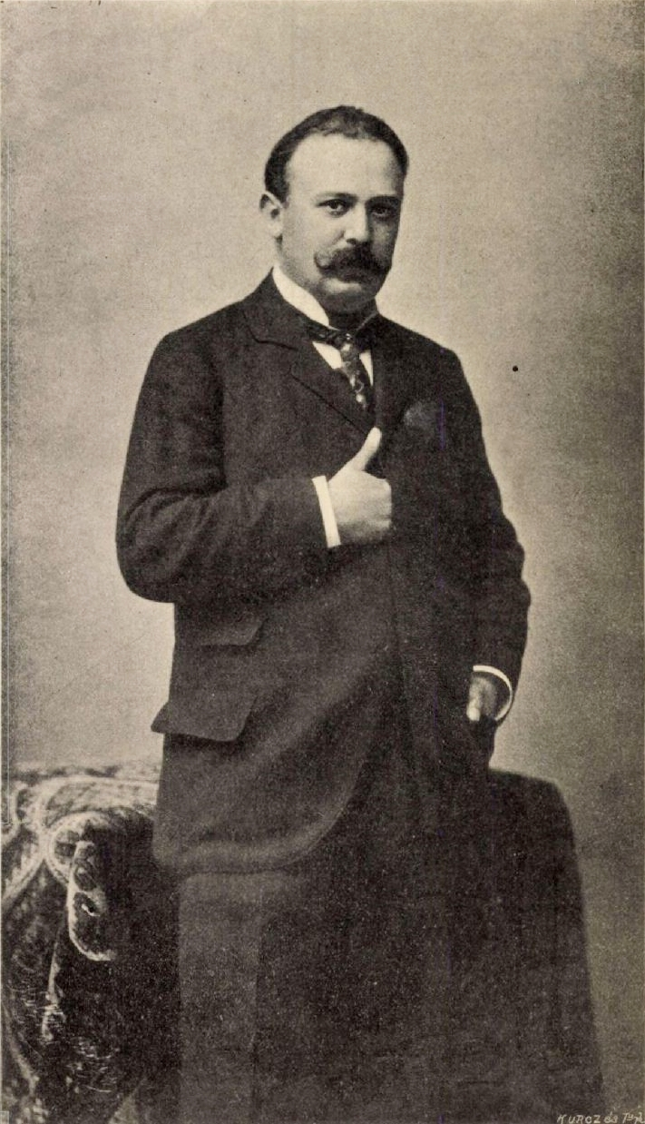 Pikler Gyula jogász